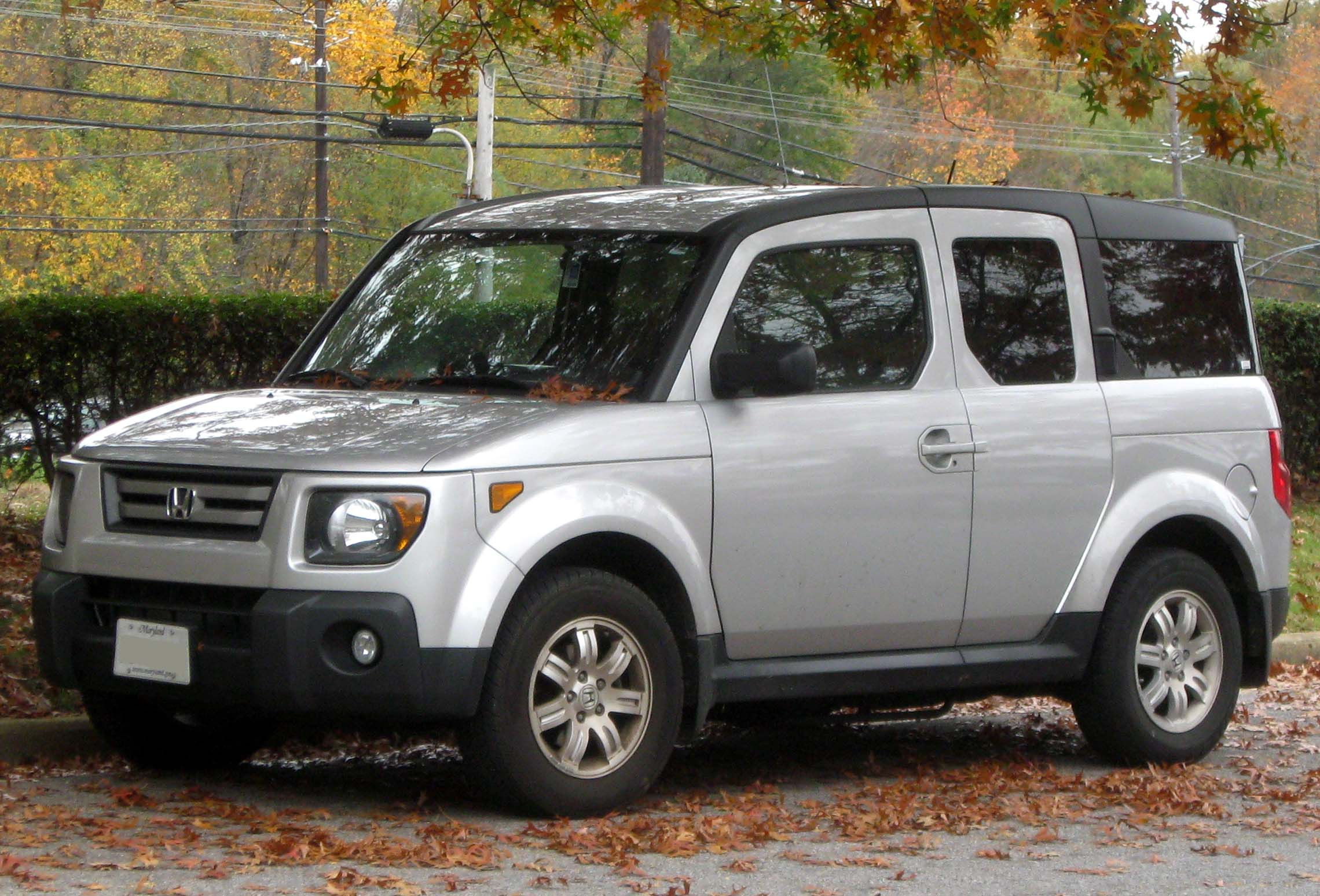 2007-2008 Honda Element photographed in Greenbelt, Maryland, USA.